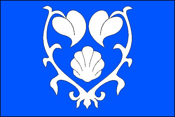 Vlajka obce Černčice (okres Náchod)